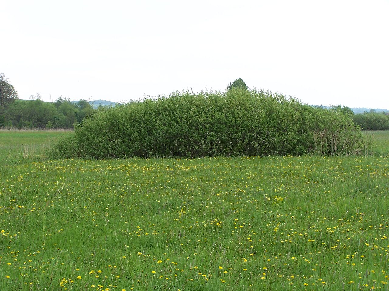 Zarośla / Scrubland Data: 2006-05-10 Autor:Jerzy Opioła